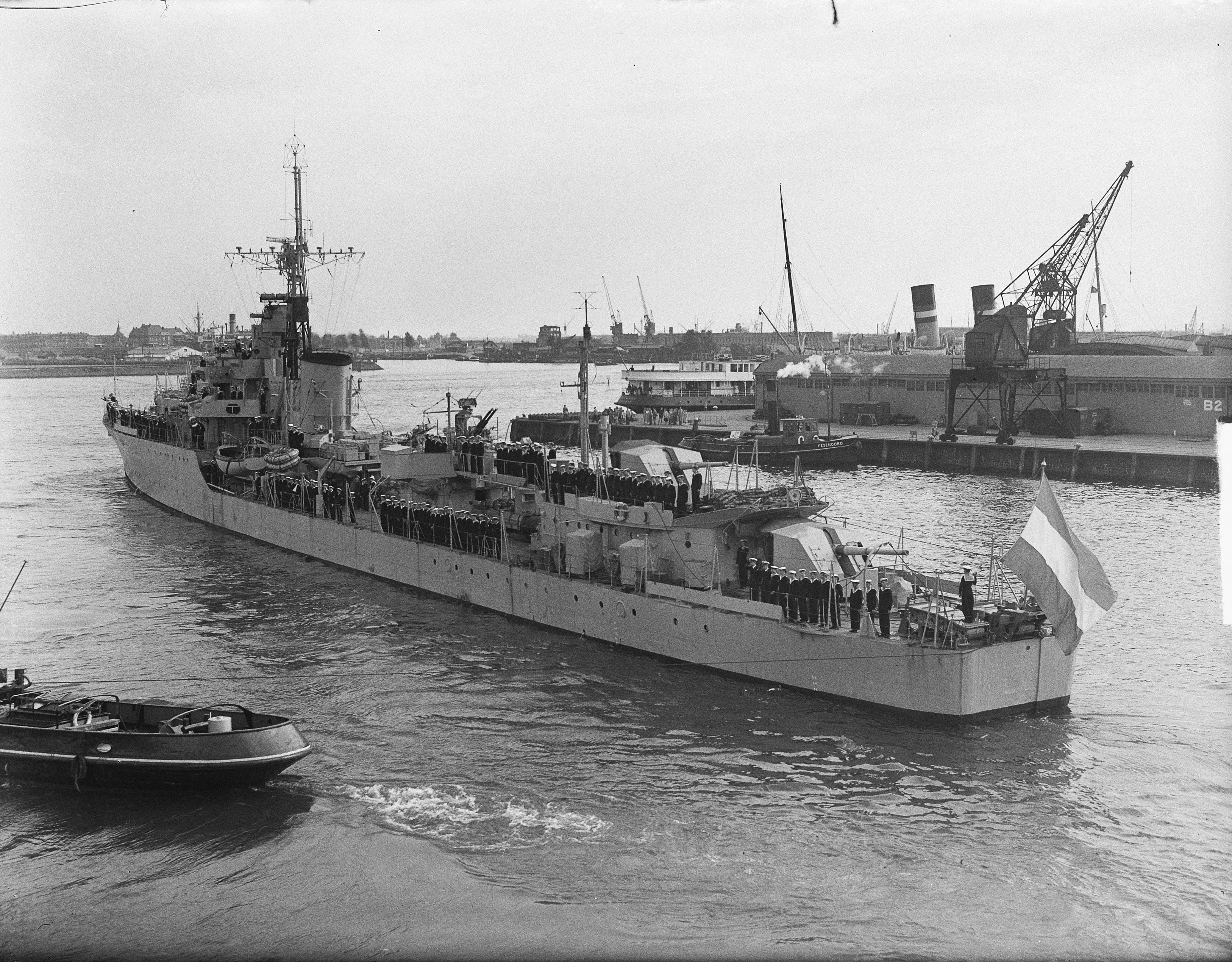 Collectie / Archief : Fotocollectie Anefo Reportage / Serie : [ onbekend ] Beschrijving : Vertrek Piet Hein uit Rotterdam voor wereldreis Datum : 27 augustus 1950 Locatie : Rotterdam, Zuid-Holland Trefwoorden : SCHEPEN, VERTREKKEN Persoonsnaam : HEIN PIET Fotograaf : Winterbergen, […] / Anefo Auteursrechthebbende : Nationaal Archief Materiaalsoort : Glasnegatief Nummer archiefinventaris : bekijk toegang 2.24.01.09 Bestanddeelnummer : 904-1555